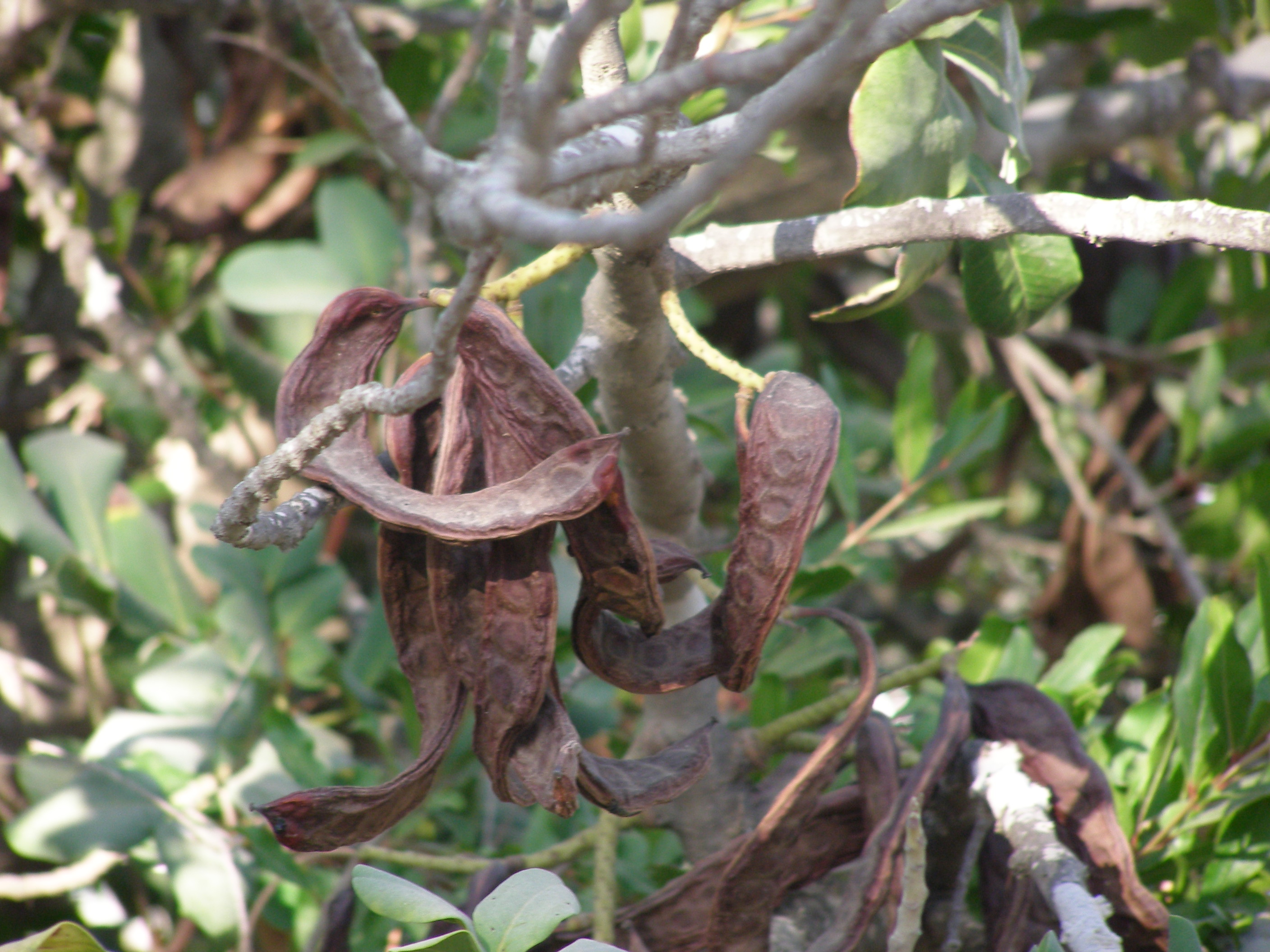 Carob (Ceratonia siliqua) ripe fruit on tree in Revivim, Israel